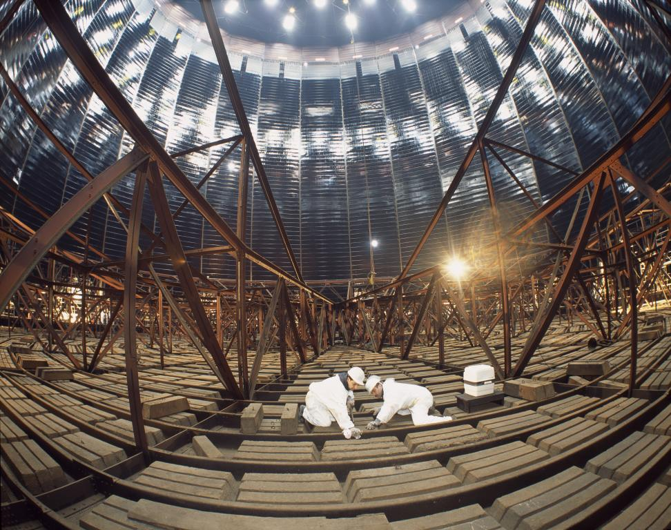 Revision des EnBW-Gaskessels in Stuttgart-Gaisburg